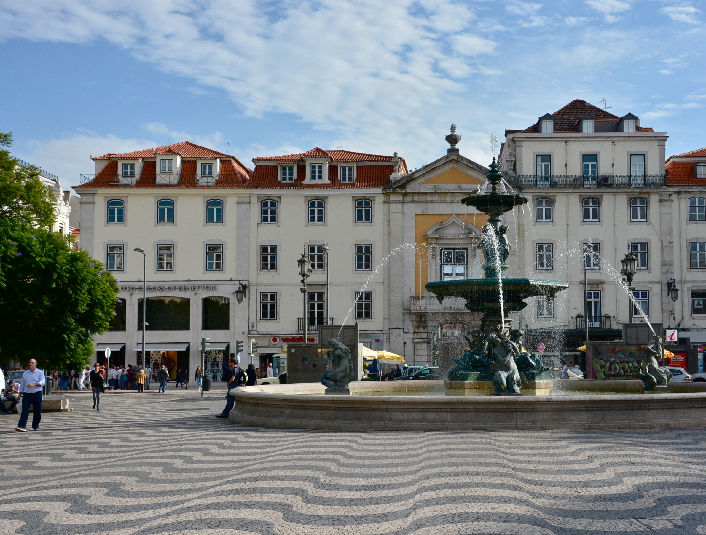 Praça Dom Pedro IV